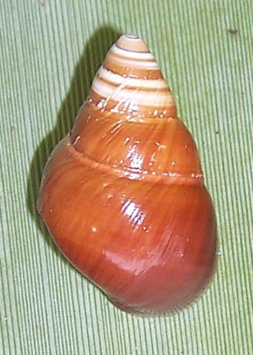 Partulina variabilis - Lanai tree snail, pupu kani oe